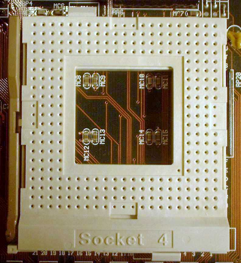 Sockel 4